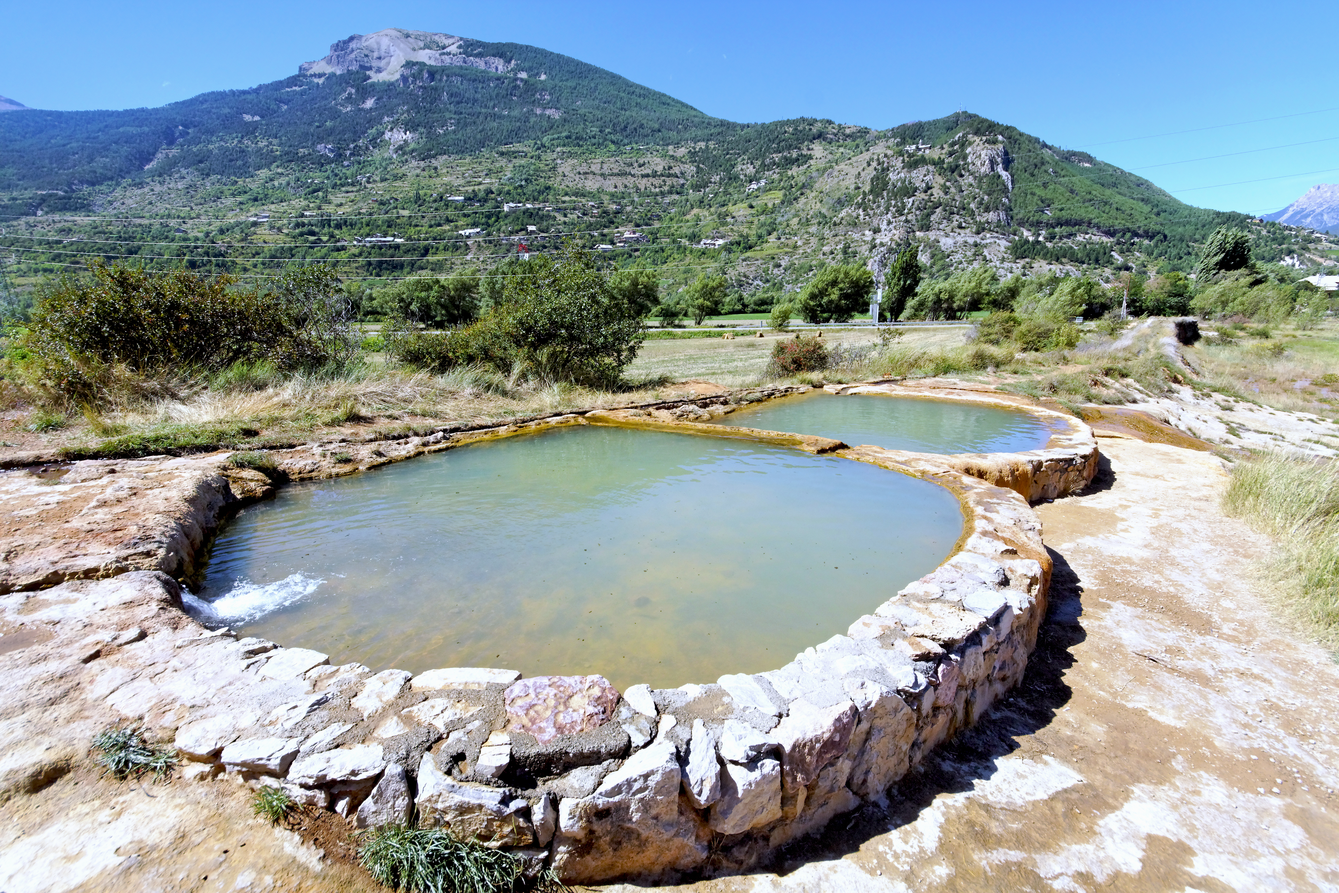 Bassins du Plan de Phazy en été